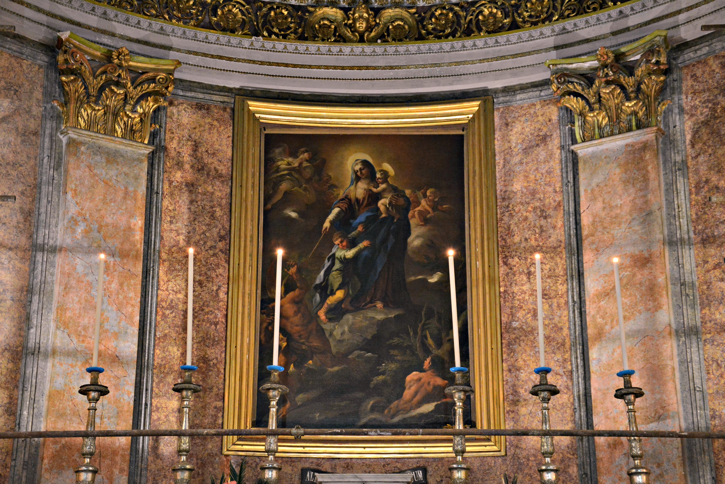 Vedi titolo